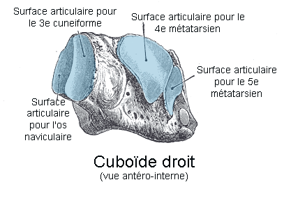 Os cuboïde